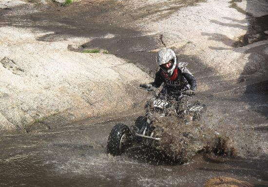 cuatris